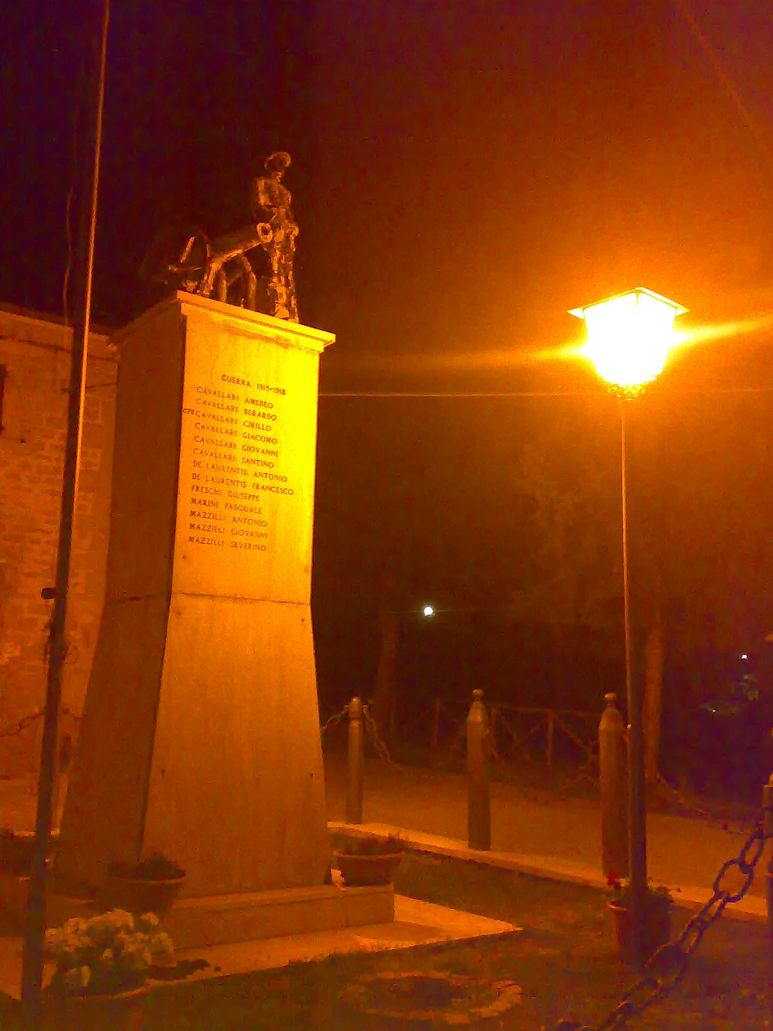 Monumento situato in Alvi di Crognaleto dedicato ai caduti della prima guerra mondiale